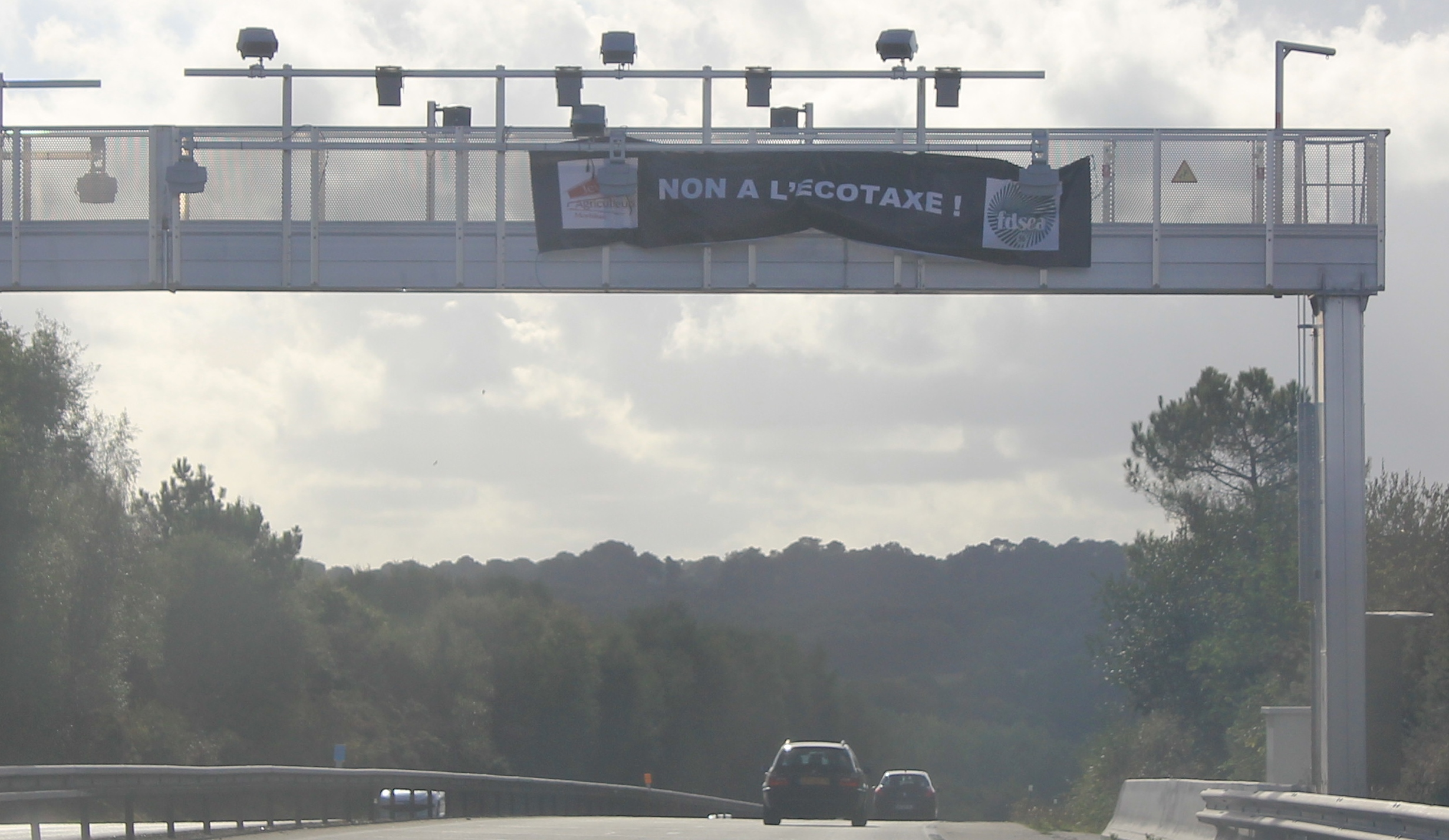 portique de prélevement de l'écotaxe portant une bannière d'opposition à la mise en place de la taxe poids lourds à hauteur de Bignan dans le Morbihan